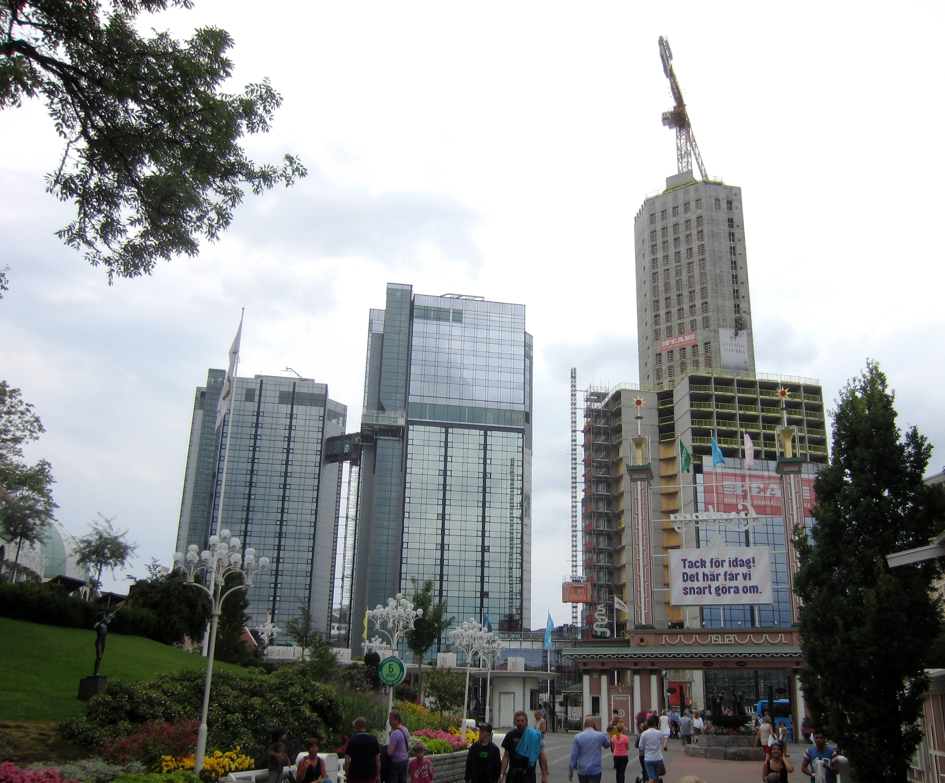 Gothia West Tower, Crown Tower och under byggnad East Tower, 28 juli 2013.